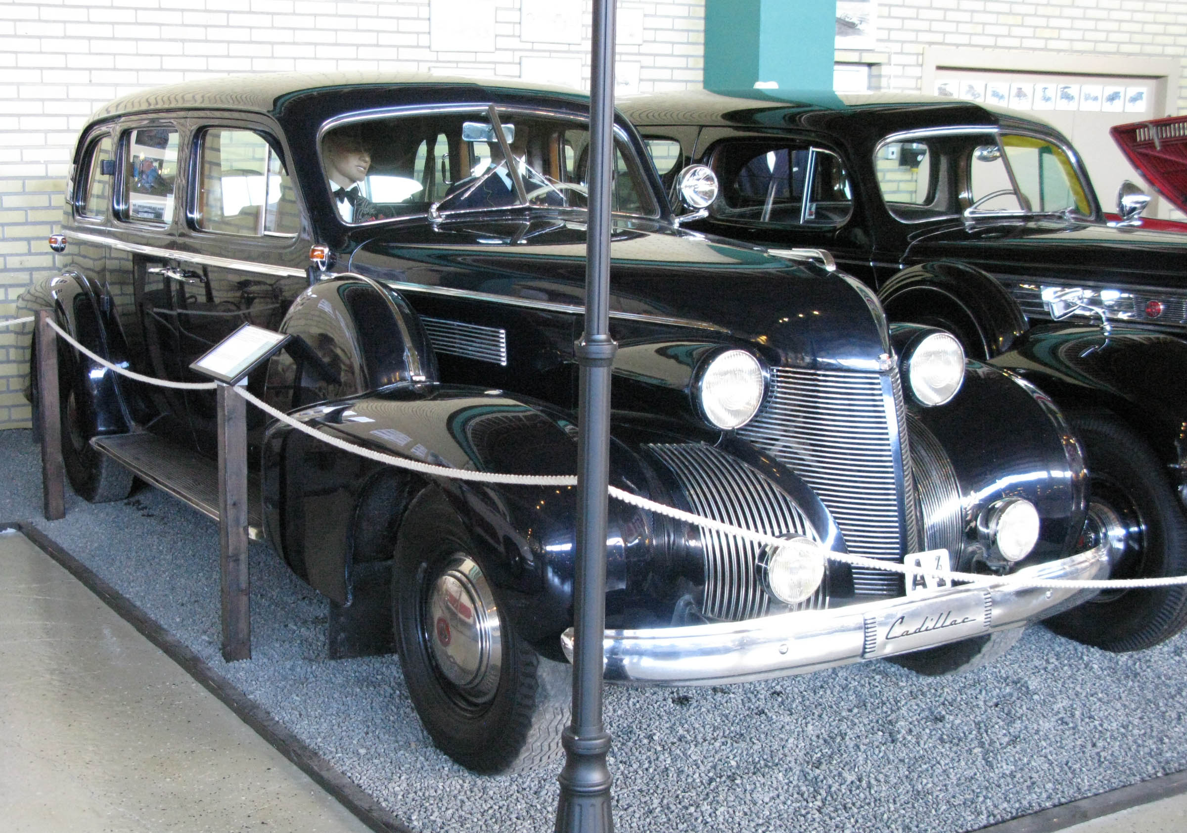 1939 Cadillac Imperial Touring Sedan